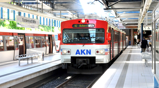 AKN Eisenbahn (AKN) treinstel VT 59 van het type Linke-Hofmann-Busch als A2 te Norderstedt Mitte.